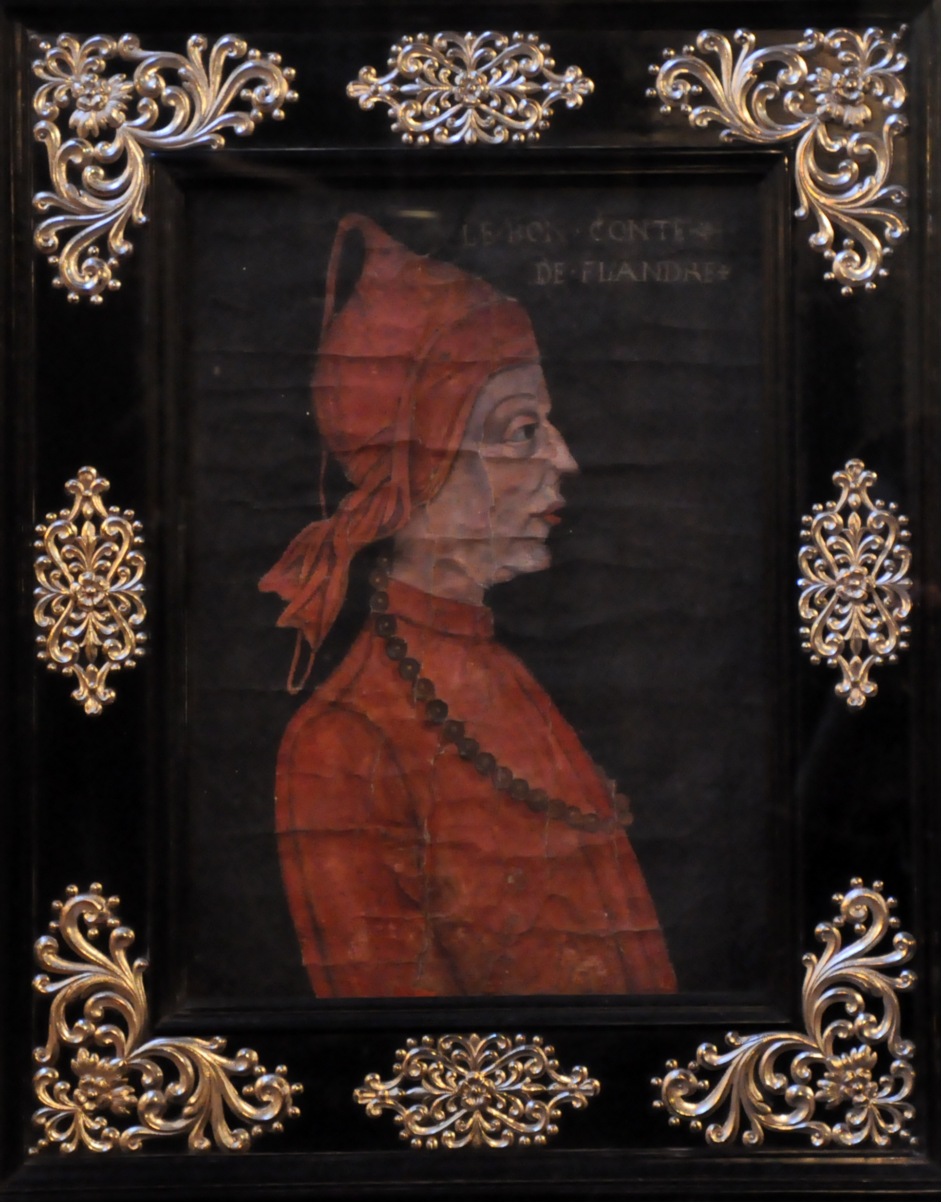 Portret op papier (15e eeuw) van graaf Karel de Goede - auteur onbekend - in de Sint-Salvatorskathedraal te Brugge